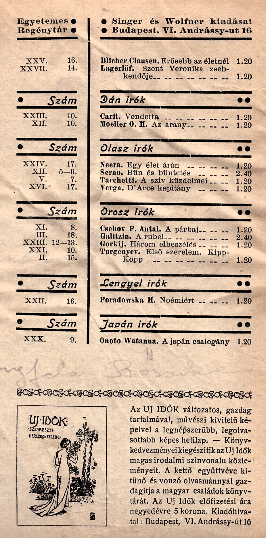 Az Egyetemes regénytár köteteinek jegyzéke (előzéklap Arthur Conan Doyle [1859-1930]: Napoleon [1911, Egyetemes regénytár] kiadásában)